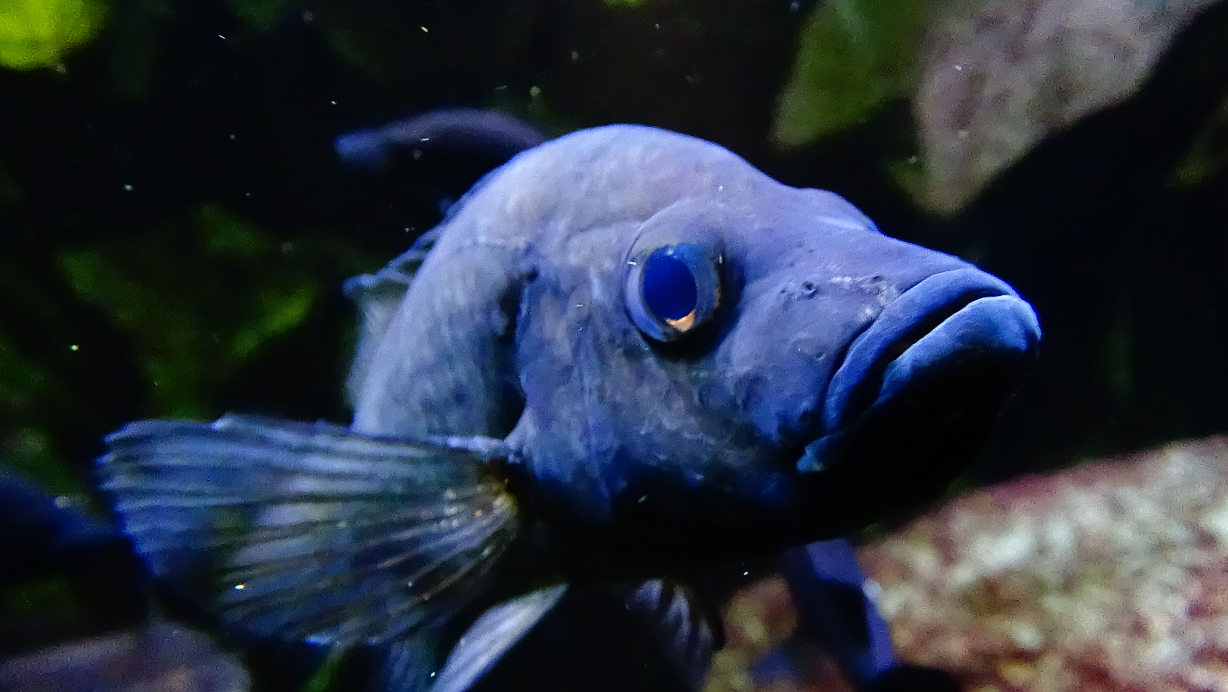 Stomatepia pindu - Adulte - Lac Barombi Mbo - Aquarium de la Porte Dorée Paris, ile France, France - 11/2014